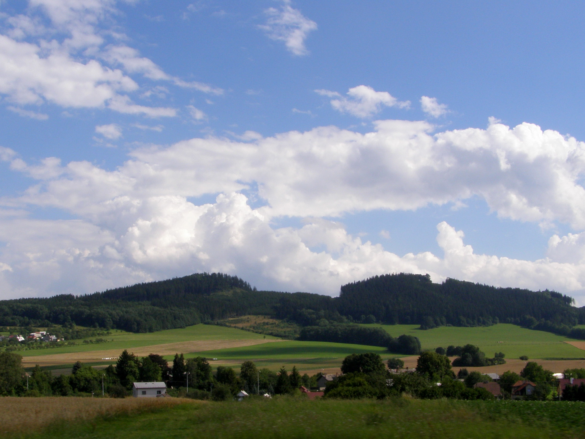 Kelčská pahorkatina, Loučská brázda a za ní Provodovický hřbet, vrchol Dobroníž (421 m), pohled od obce Loučka